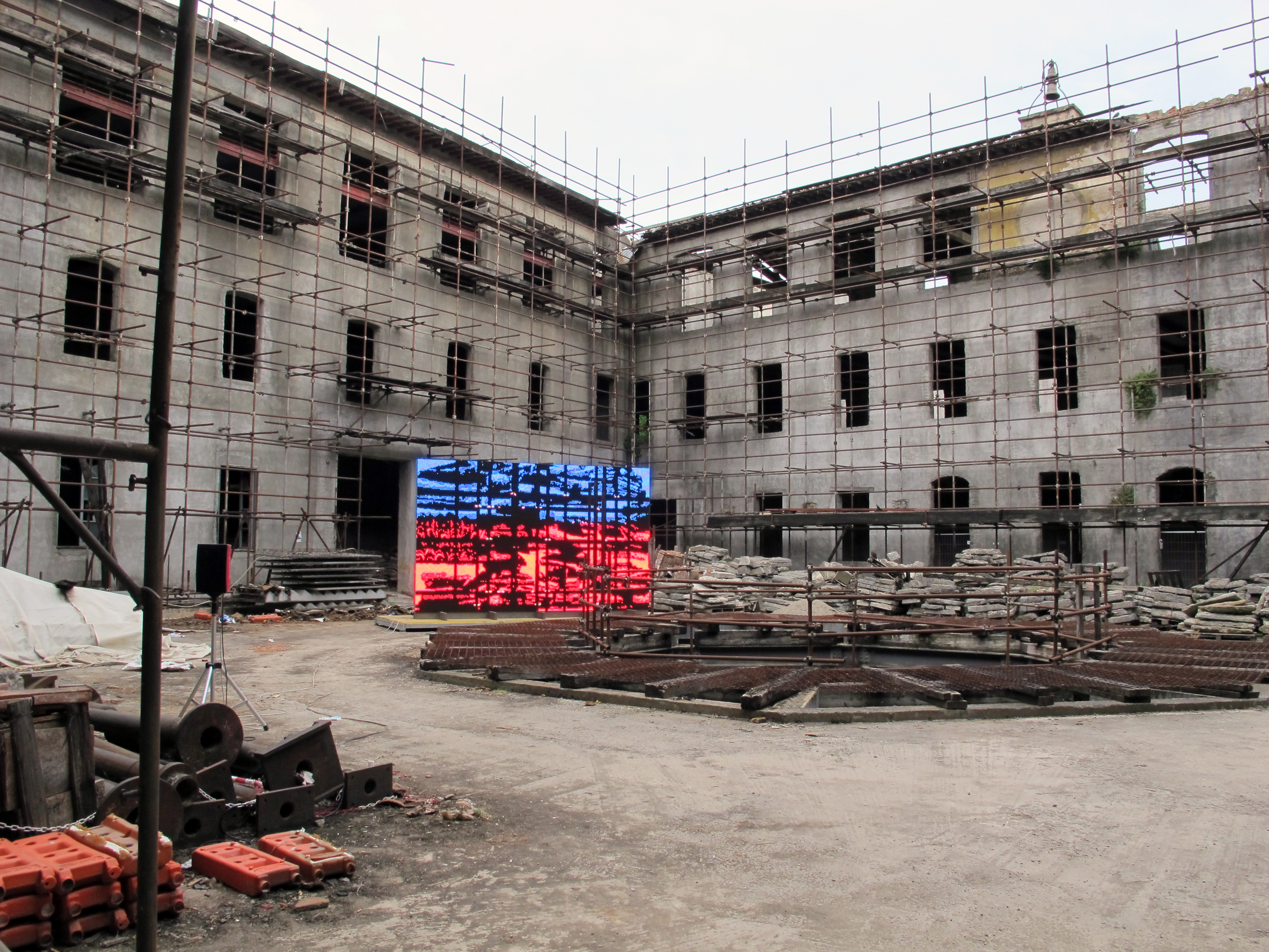 Firenze